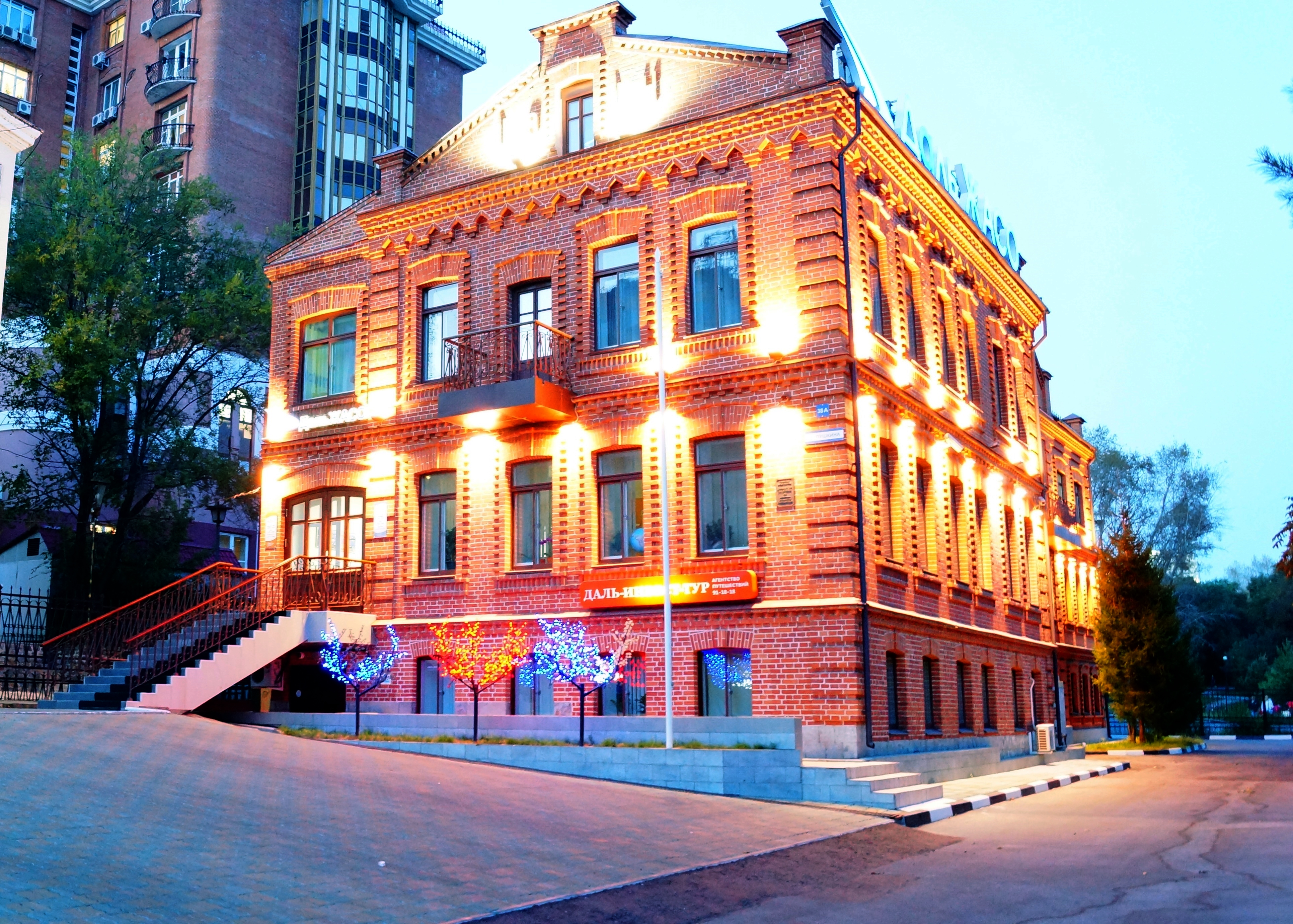 Дом доходный Петренко В. В.: улица Пушкина, 38а, Хабаровск, Хабаровский край